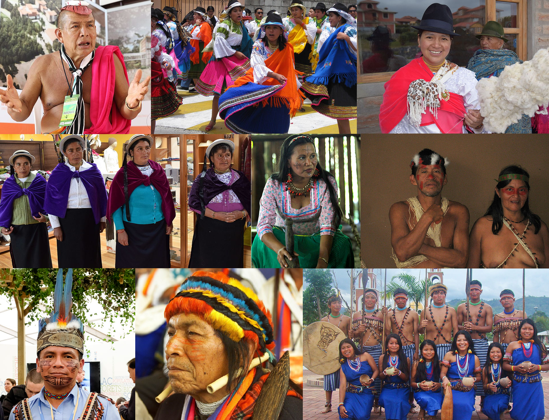 Montaje de algunas nacionalidades y pueblos indígenas de Ecuador.